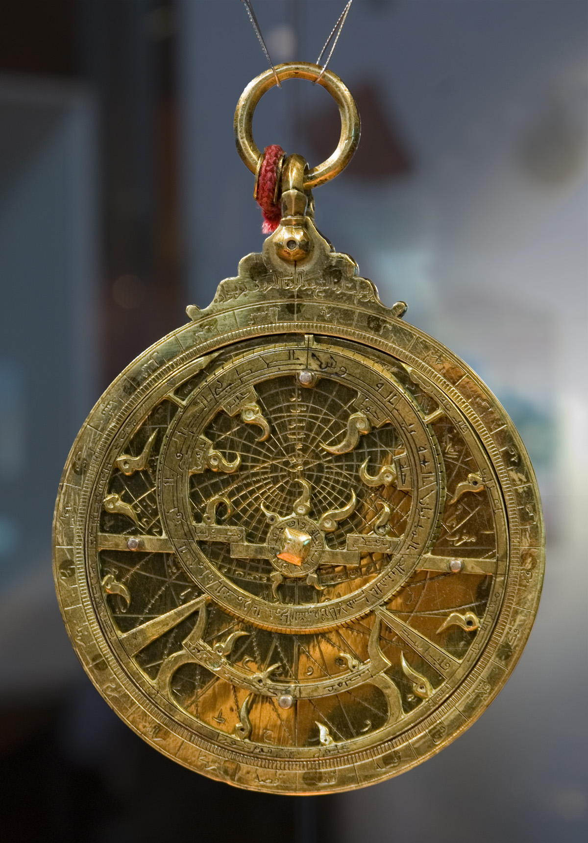 Astrolabe planisférique Mère et tympan : Turquie ottomane, 1098 H / 1686-1687 Araignée: maghreb, vers 1850 Laiton à décor gravé et incisé D. 10,2cmParis, musée de l'Institut du monde arabe, AI 86-45Legs Destombes